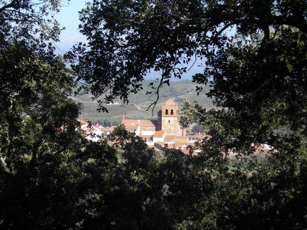 Vista de la Iglesia de San Sebastián, en la localidad de Higuera (Cáceres, España)